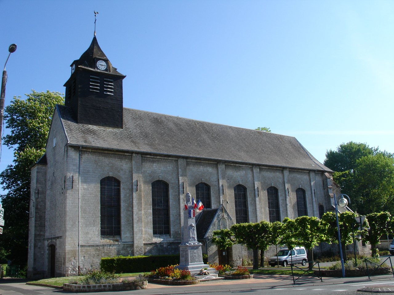 Église d'Aubigny-en-Artois